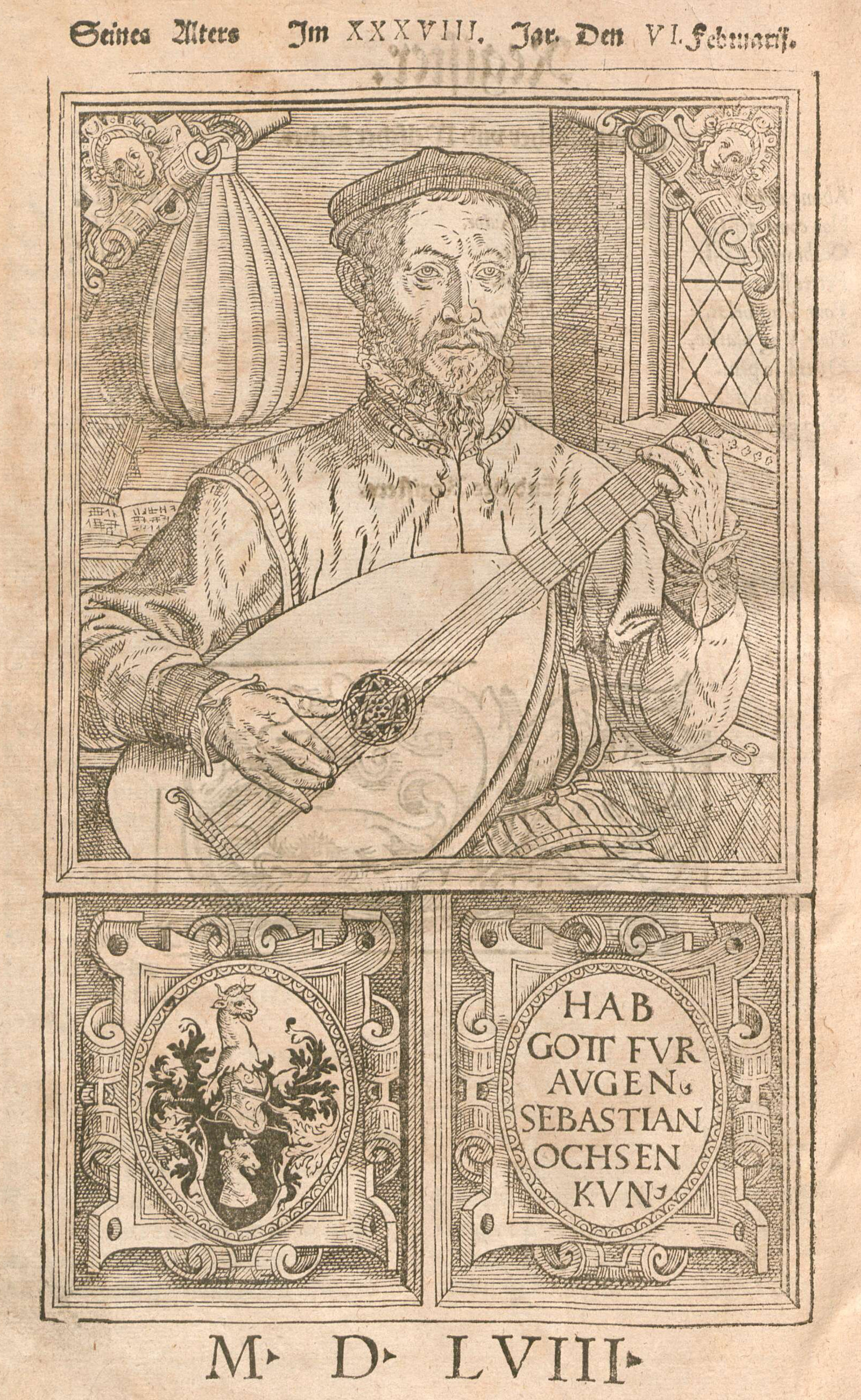 Luitmuziek Sebastian_Ochsenkhun